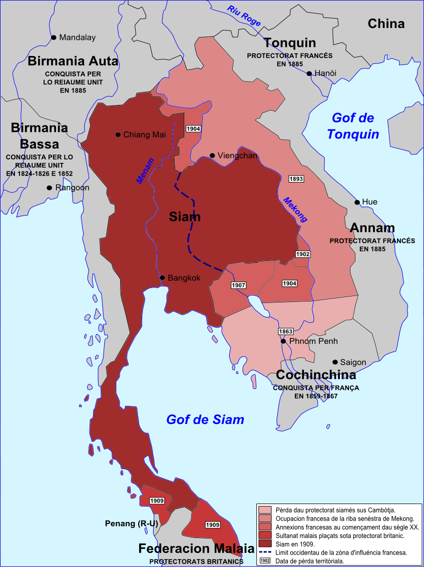 Pèrdas territòrialas de Siam dins lo corrent dau periòde coloniau.